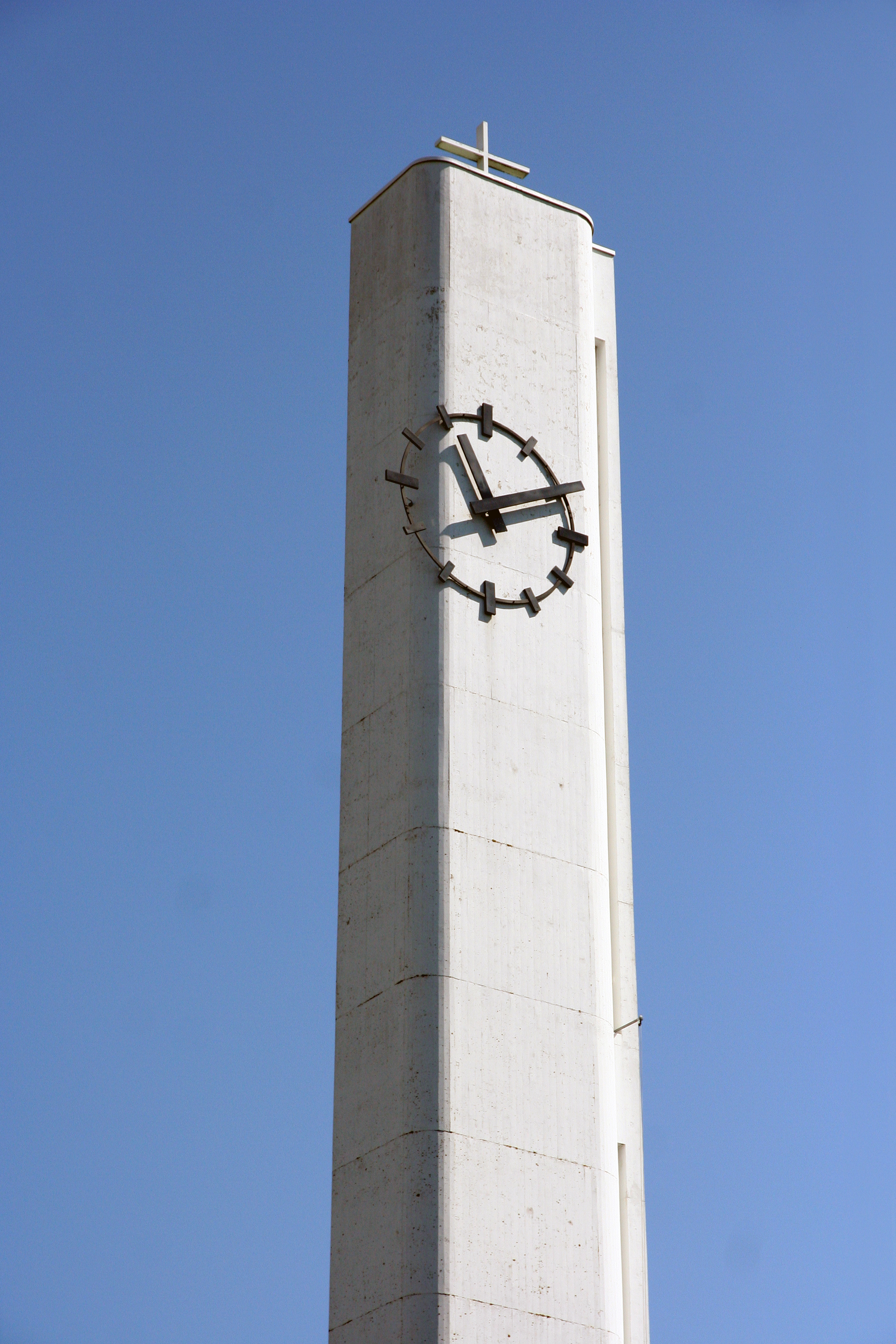 Römisch-katholische Pfarrkirche St. Josef Schlieren, Kirchturm